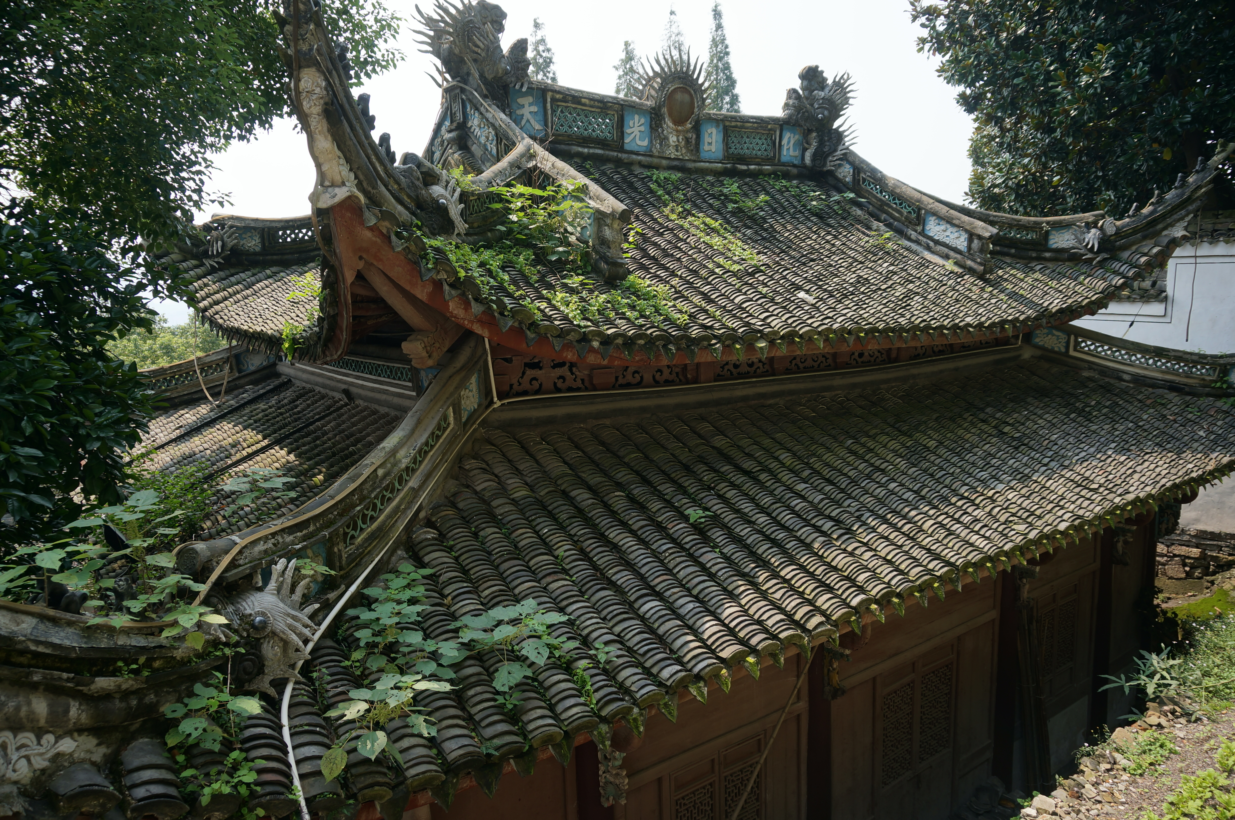 余姚城隍庙山门，北侧俯视。